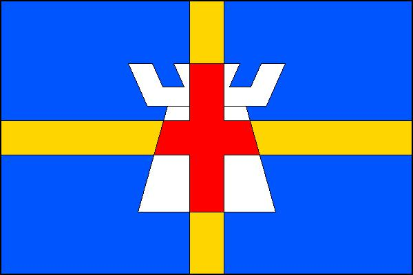 Vlajka obce Martínkovice